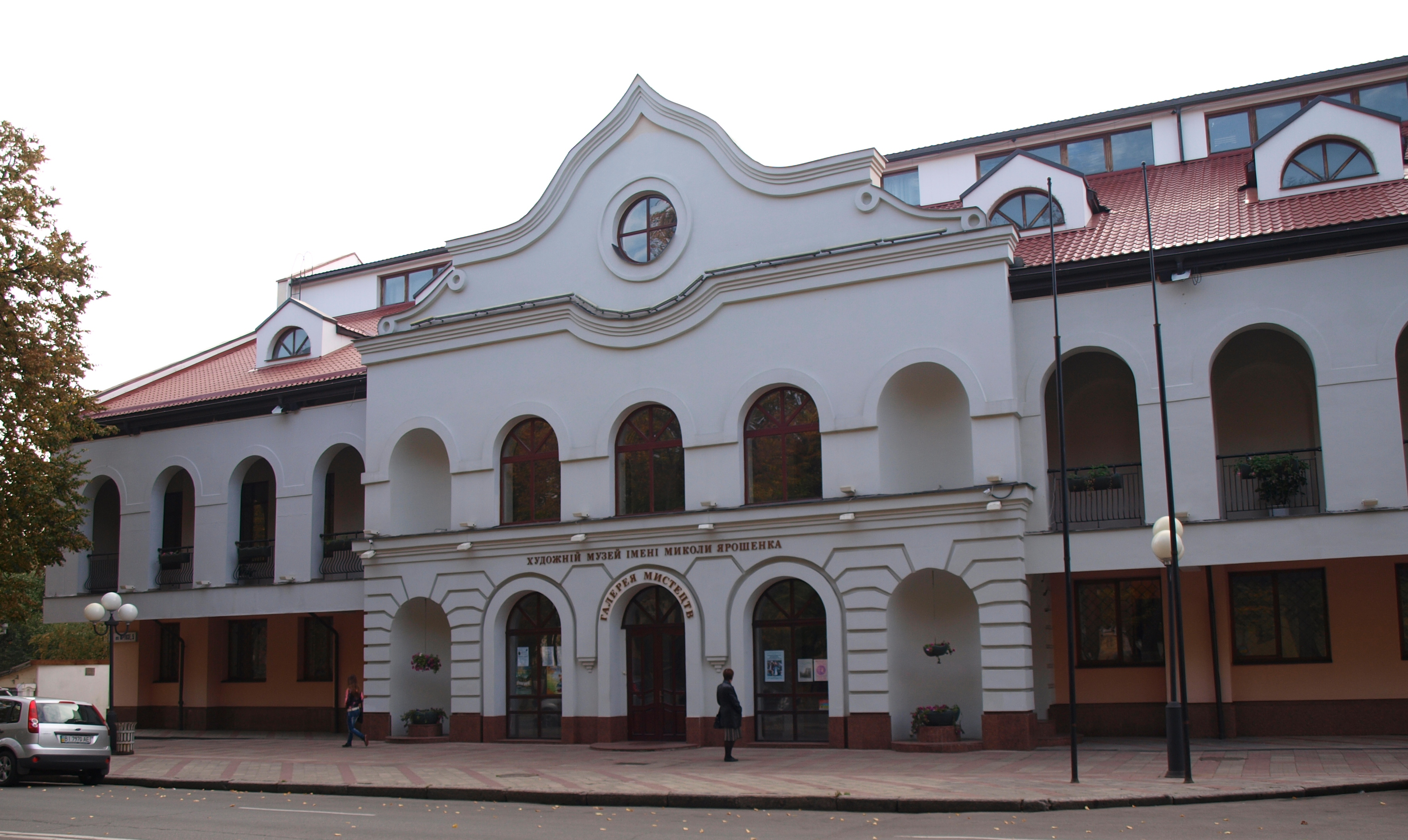 Здание Полтавской галереи искусств (Художественного музея имени Николая Ярошенко)